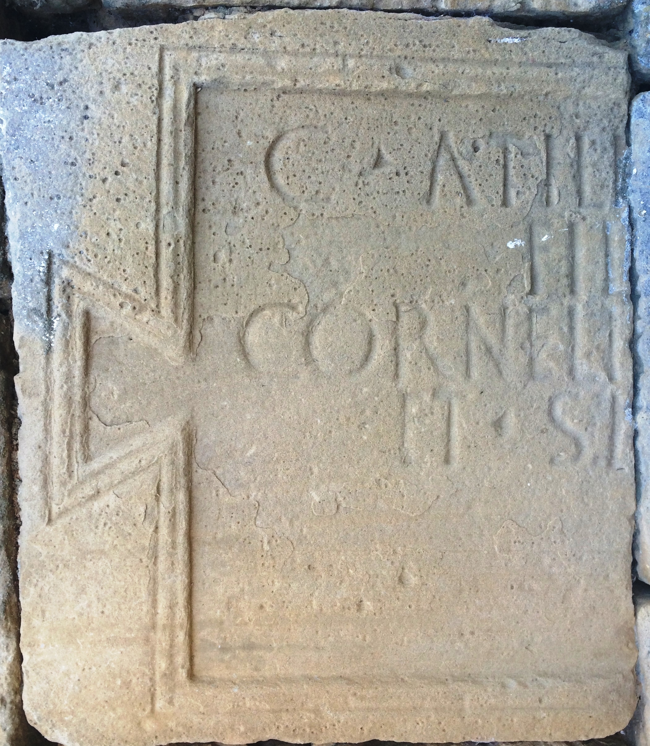 Inscripción funeraria C(aio) Atili[o filio ¿Aquilo?] / Corneli(a) f[ilia ¿? Placida] / H(ic) S(itus) E(st) CIL II 2974 y ERZ 33